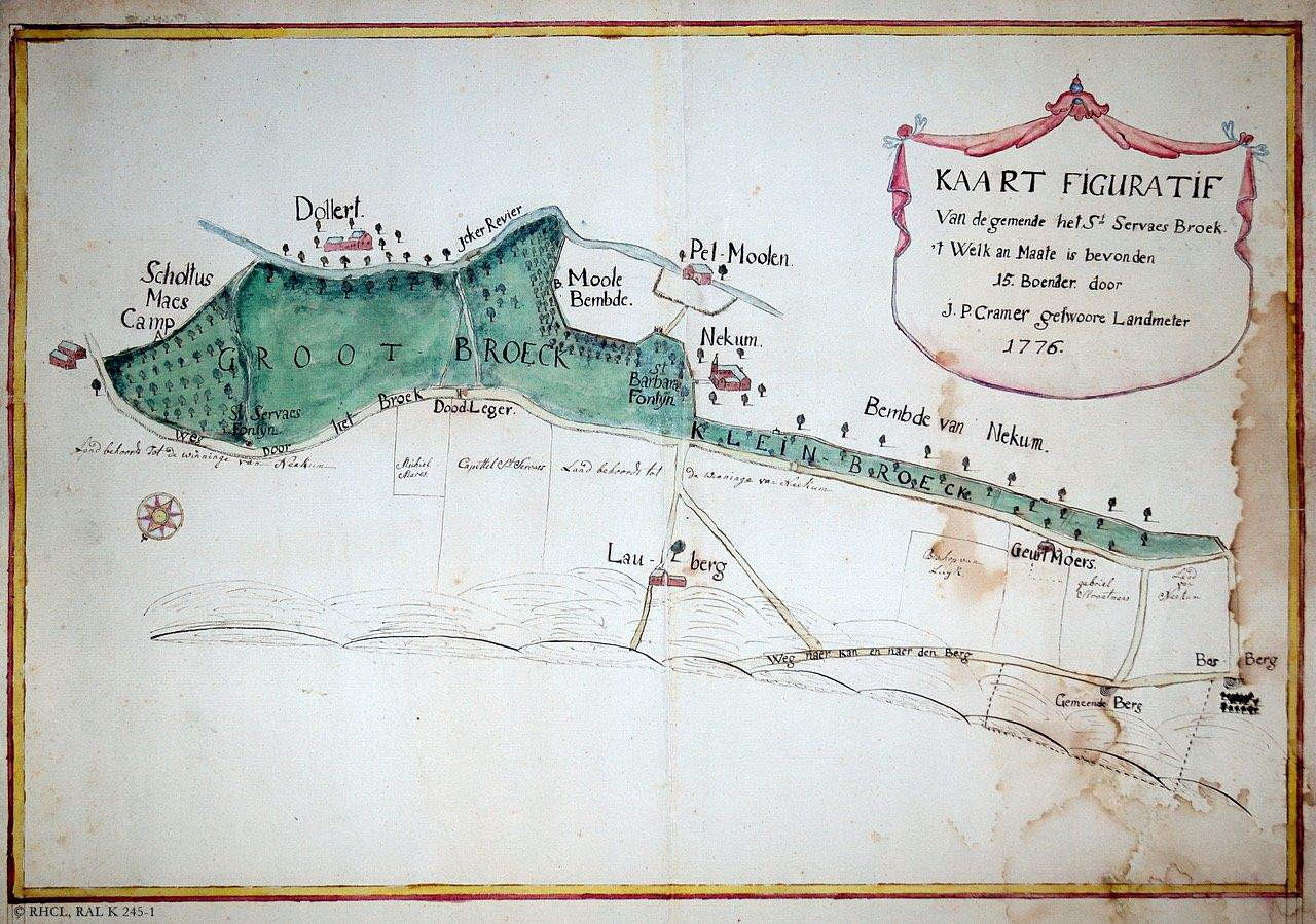 Kaart uit 1776 van het Sint-Servaasbroek in het Jekerdal bij Maastricht. Het bosachtige gebied van 15 bunder bestond uit het "Groot-Broeck" en het "Klein-Broeck", die als "gemende" (gemene grond) in gebruik waren. In de omgeving bevonden zich de Sint-Servaasbron, de Sint-Barbarabron, de watermolens Molen van Dollaert ("Dollert") en Nekummermolen ("Pel-Molen"), de Hoeve Nekum, de Apostelhoeve (bij "Lau-berg") en de kalksteengroeven "Gemeende Berg" en "Bos-Berg".